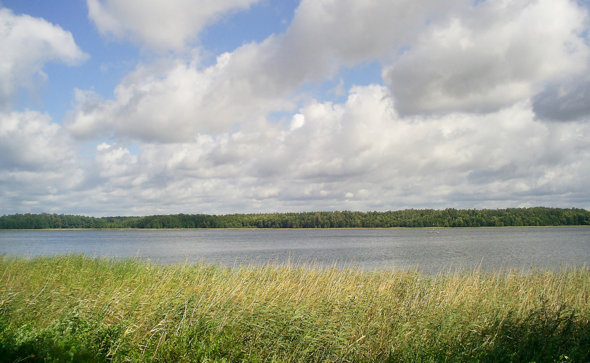 Jezioro Kisjano